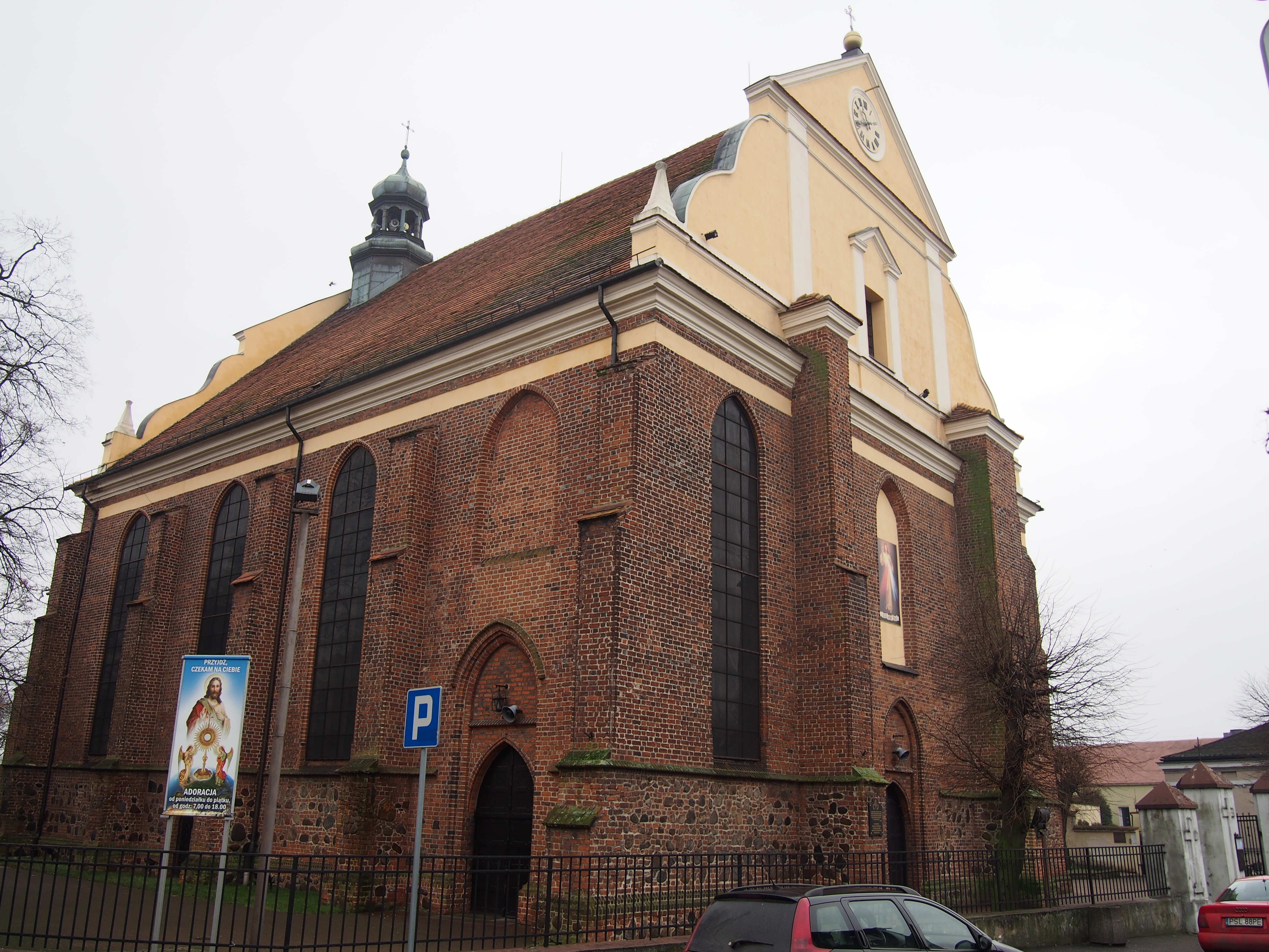 ul. Kościelna 3 w Słupcy.